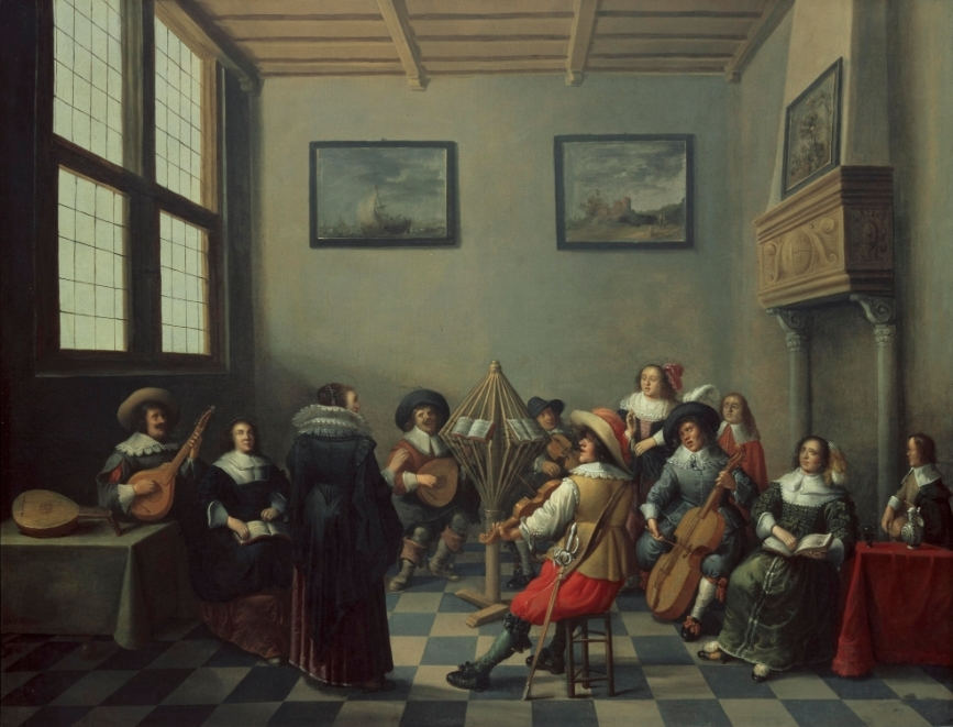 ook ten onrechte geïdentificeerd als het Utrechtse Collegium Musicum